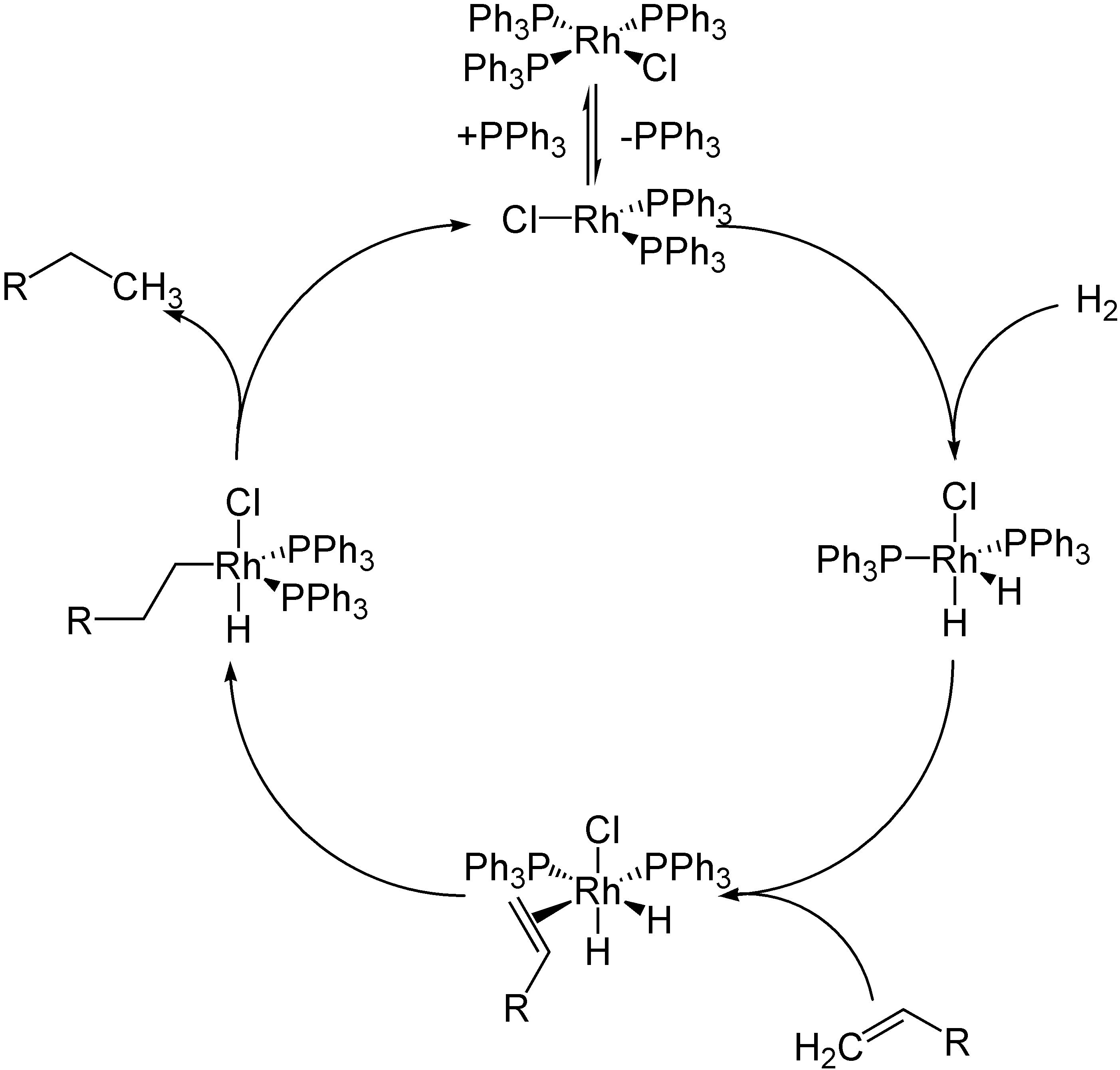 Katalysezyklus des Wilkinson-Katalysators